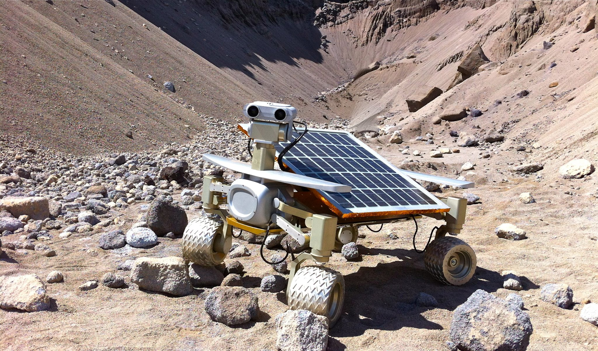 Rover "Asimov Jr. R3" von den Part-Time Scientists bei Fahrtests am Schlackenberg des Erzbergs in Eisenerz, Österreich.